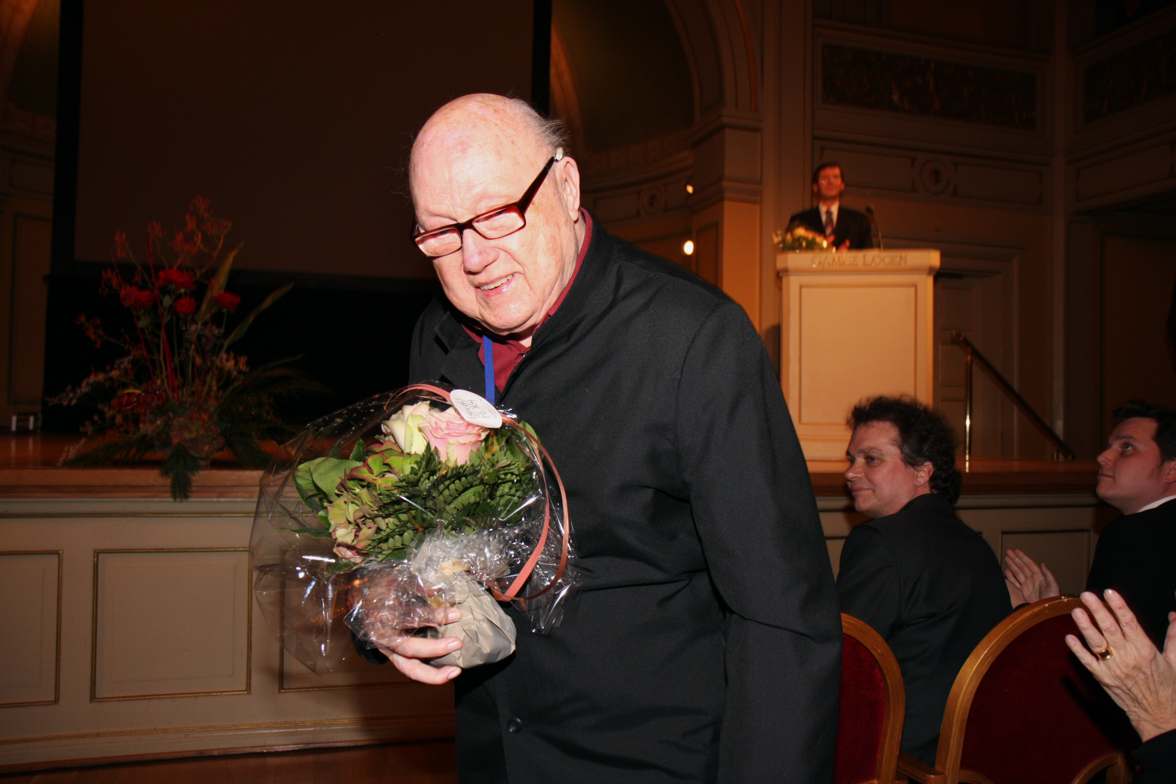 Eric Ericson, grundare av Eric Ericsons kammarkör. Kören fick Nordiska Rådets musikpris vid Nordiska Rådets session i Oslo. 2007-10-31. Foto: Magnus Fröderberg/norden.org